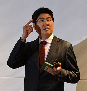 MBC 2015 메이저리그 & KBO리그 기자간담회